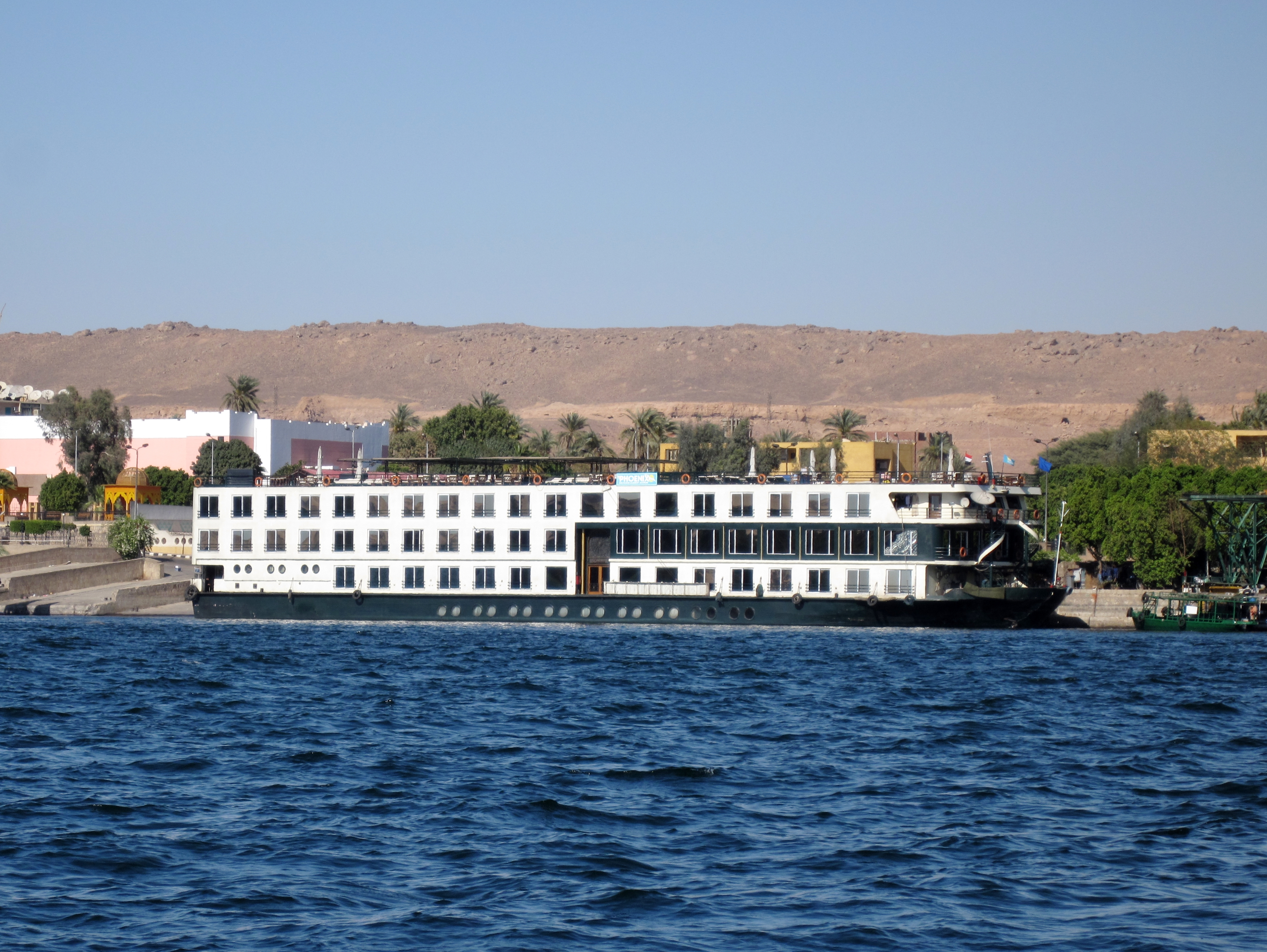 MS Zeina in Assuan (Aswan)